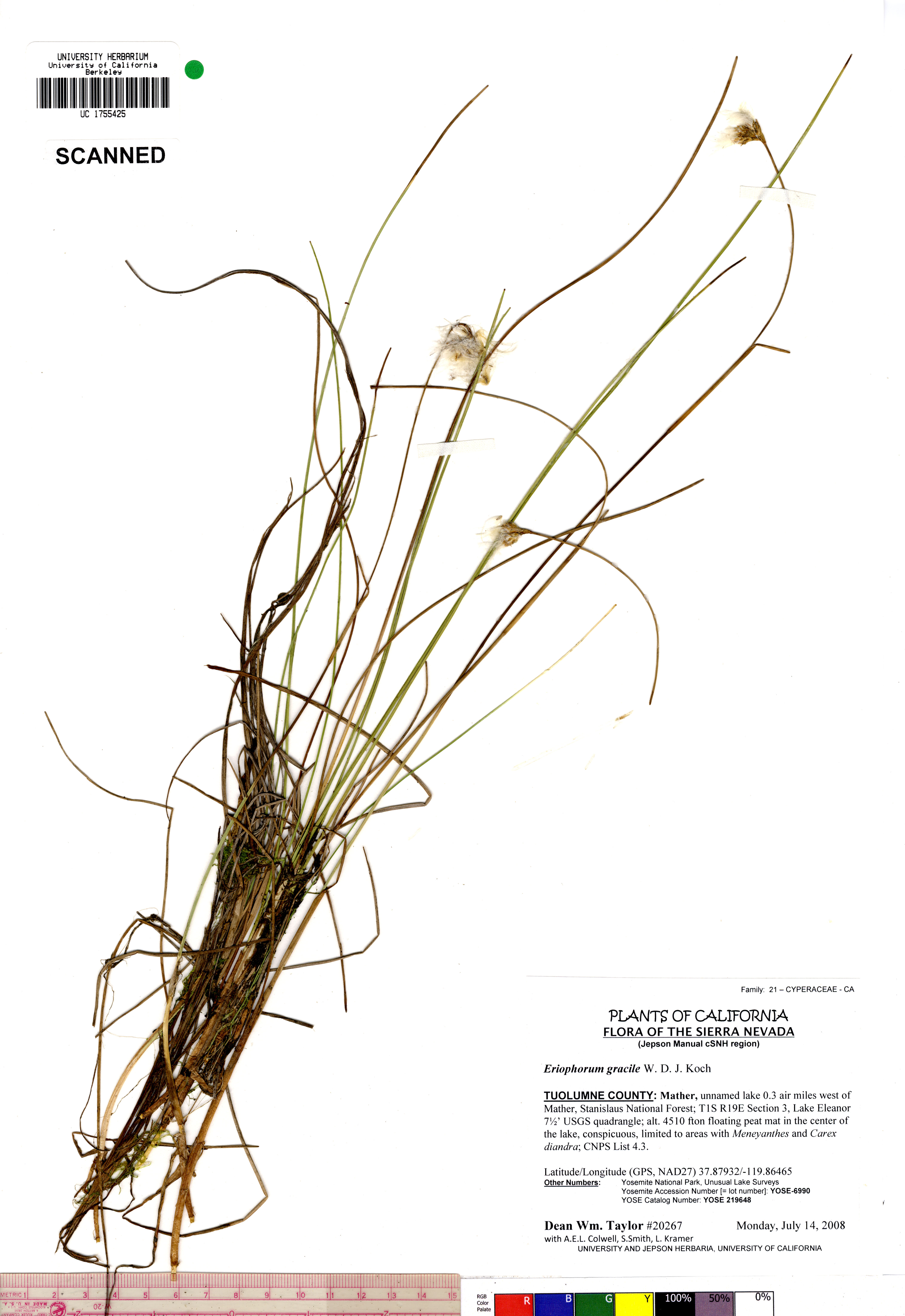 Eriophorum gracile UC1755425